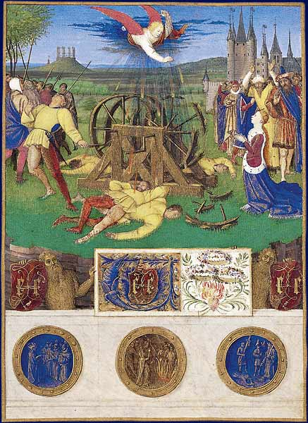 A l'arrière plan, le gibet de Montfaucon et l'église et la tour du Temple de Paris.